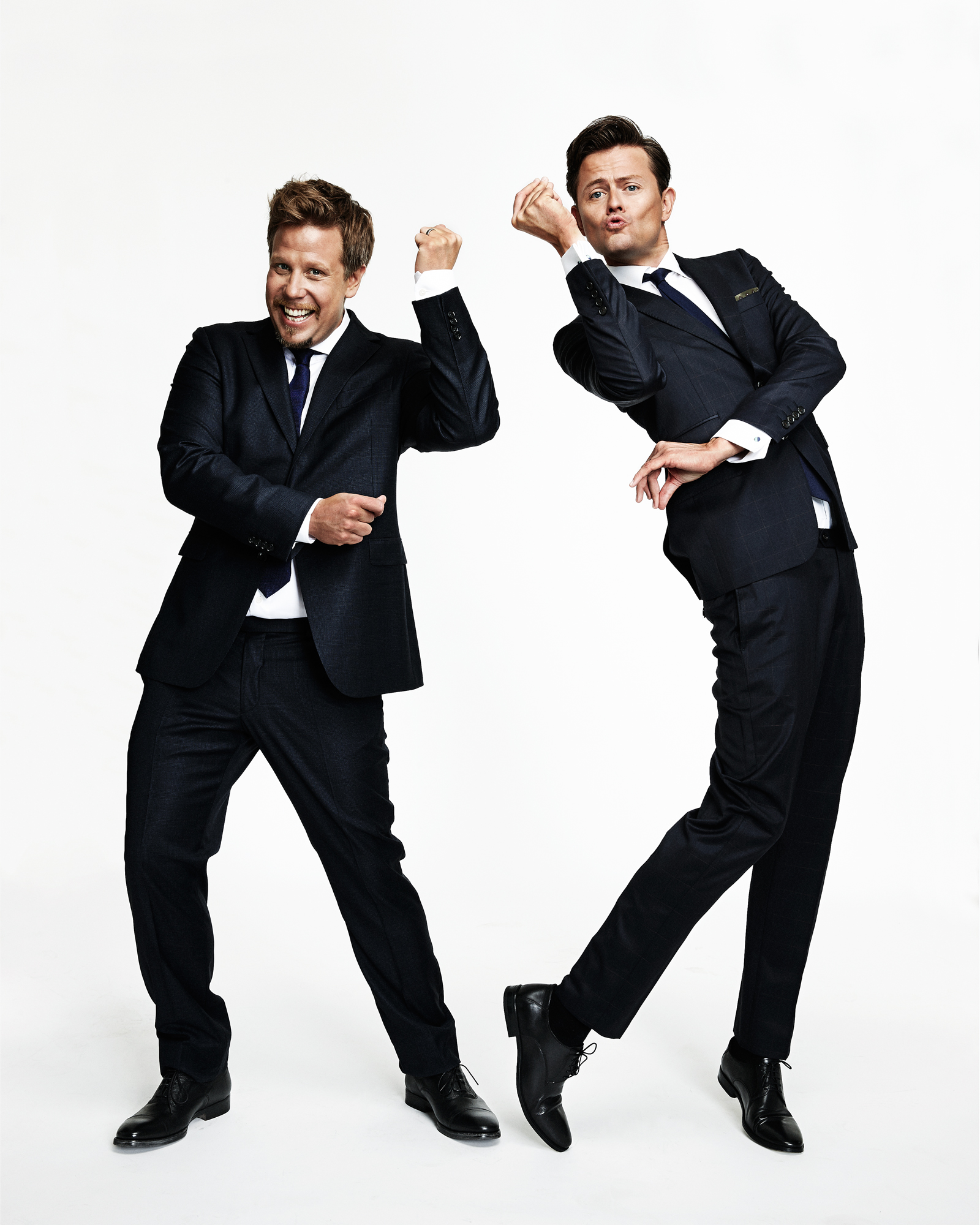 Pressbild på Filip Hammar och Fredrik Wikingsson.